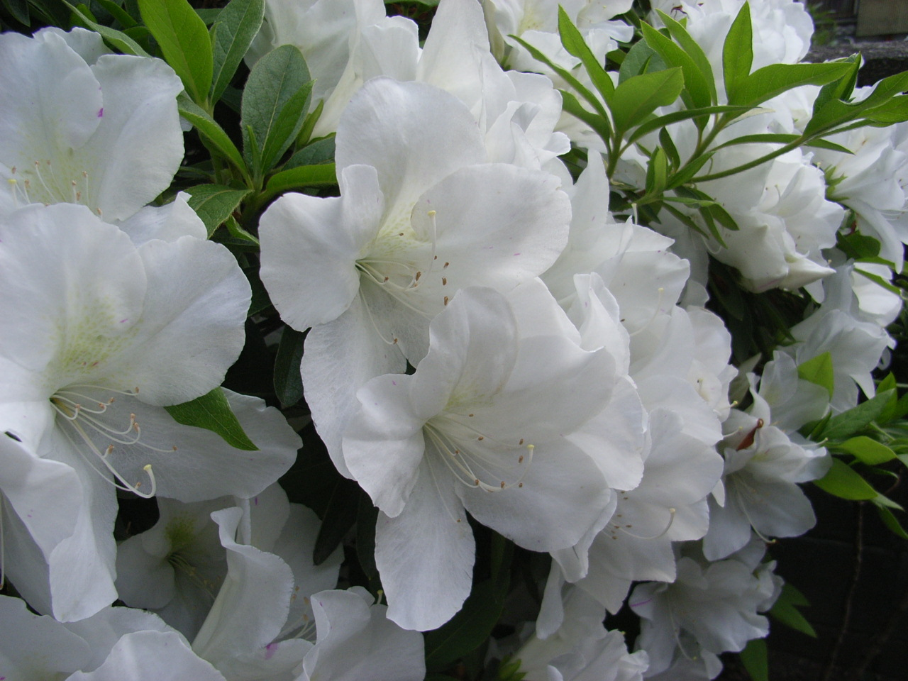 白いツツジ